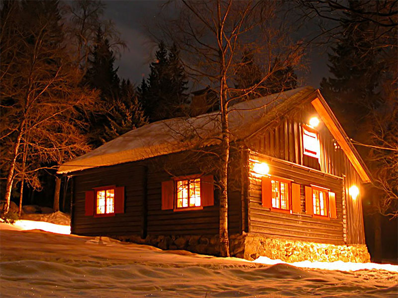 Vinterkveld ved Sandbekkstua